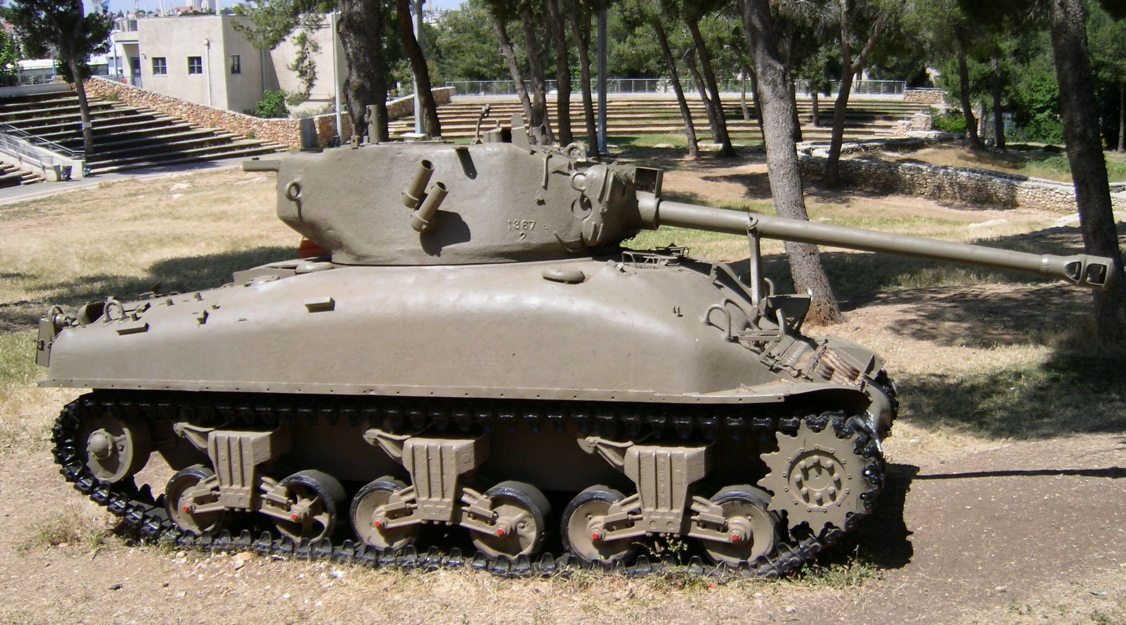 Sherman Panzer M4A1 mit amerikanischer M1A2-Kanone (Vgl.: Ford, Roger: The Sherman Tank. ISBN: 1862270422) der Israel Defense Forces in der Gedenkstätte Ammonution Hill in Jerusalem